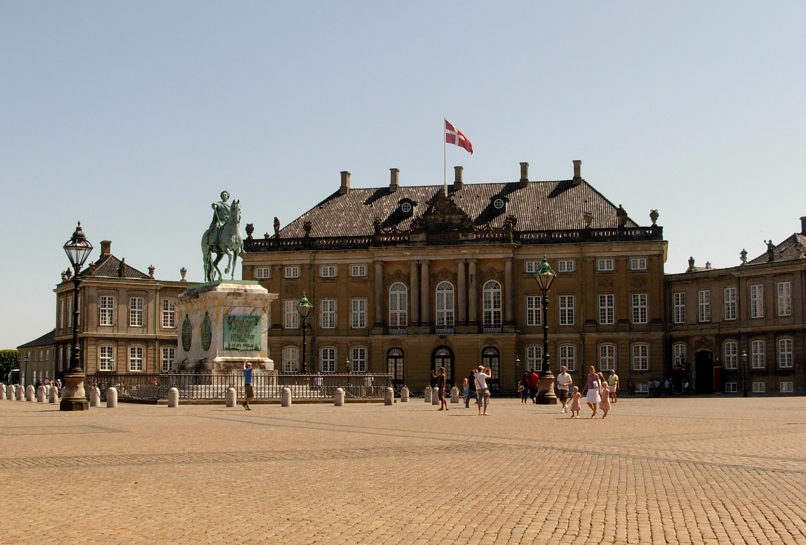 Amalienborgo rūmai Kopenhagoje.